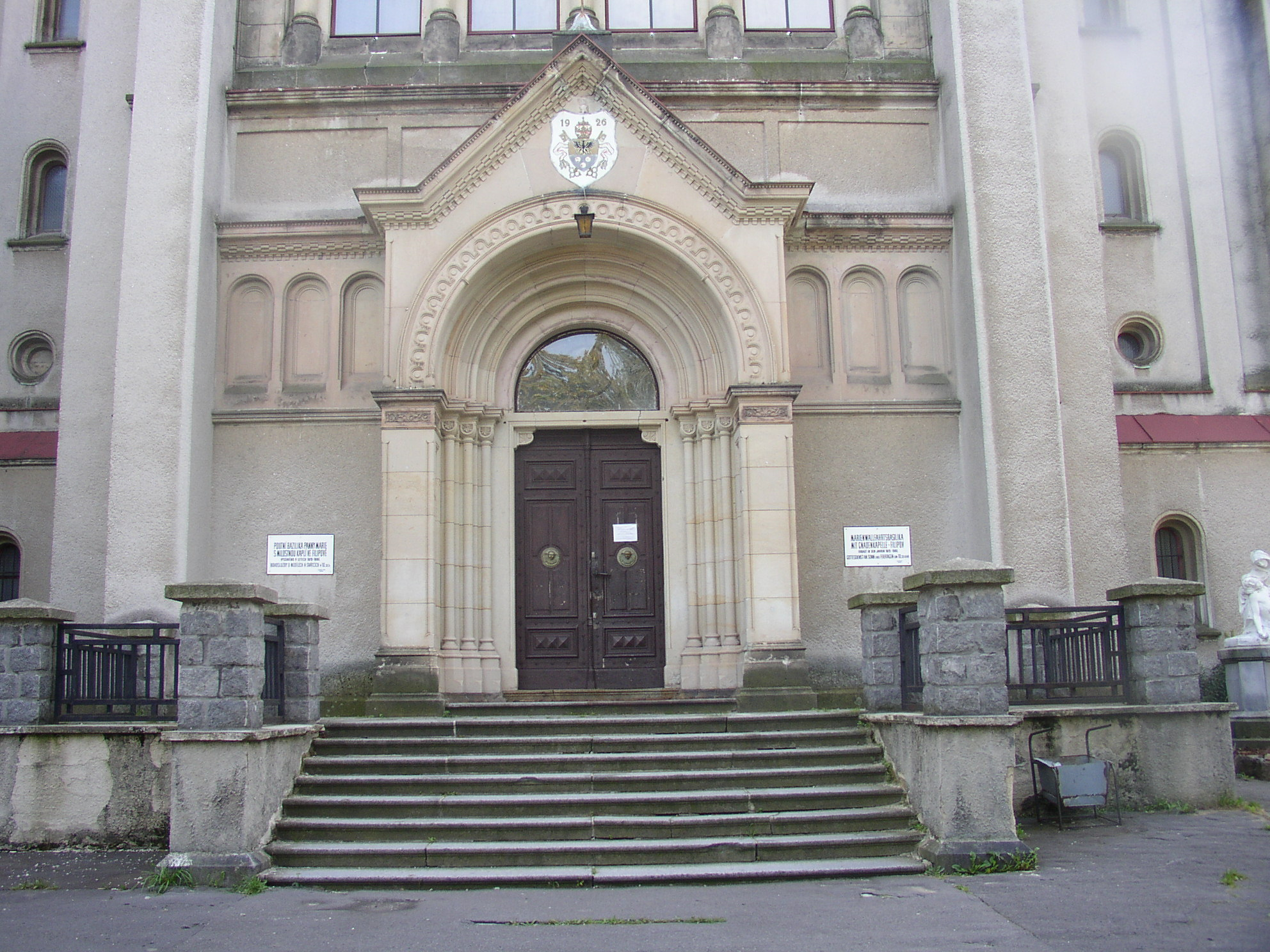 Průčelí baziliky minor Panny Marie Pomocnice křesťanů ve Filipově